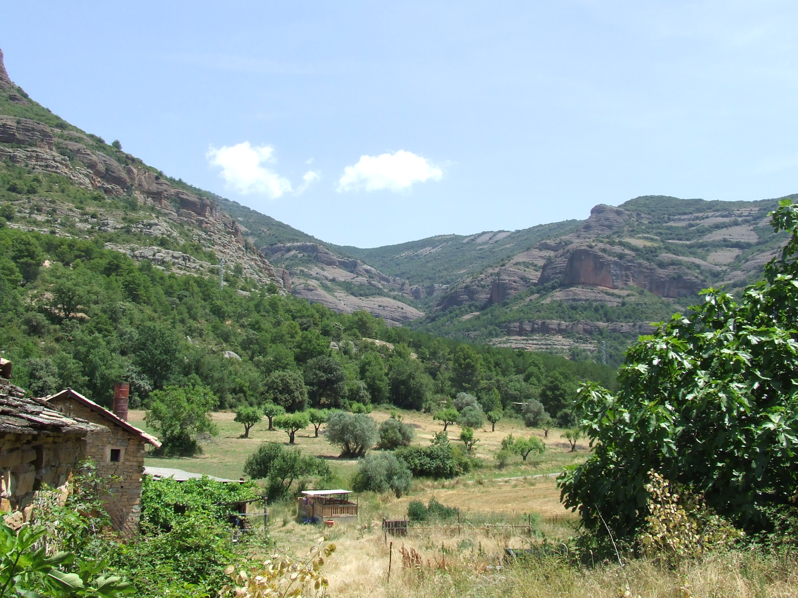 La vall de la llau de Gelat (la Pobla de Segur, Pallars Jussà)